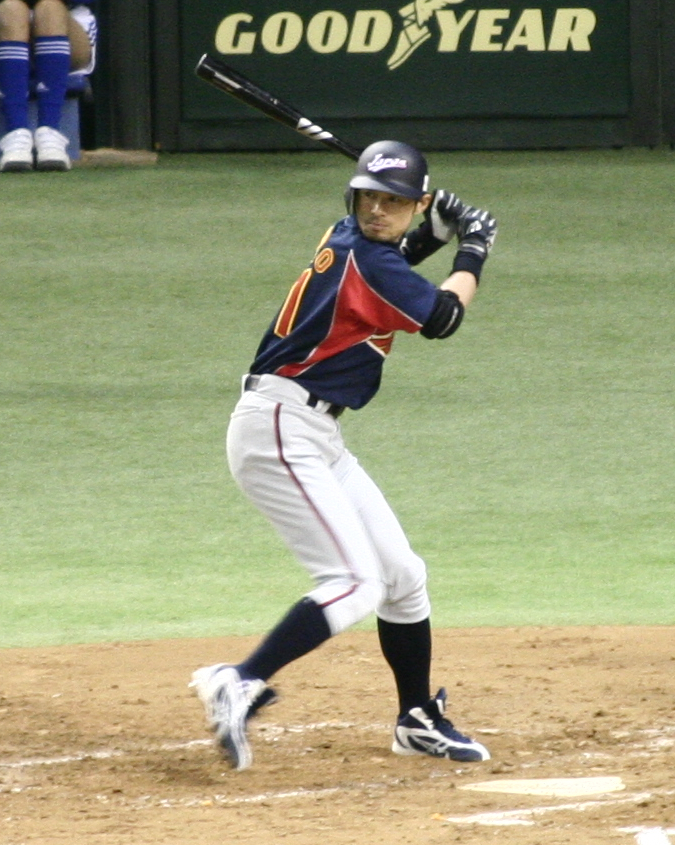 イチロー